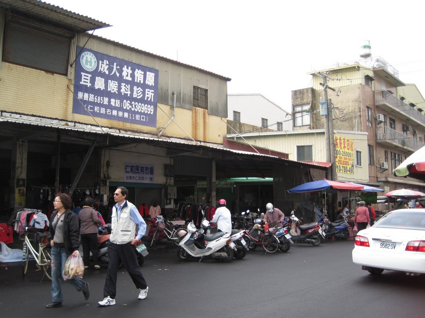 台南市和平里的菜市場。